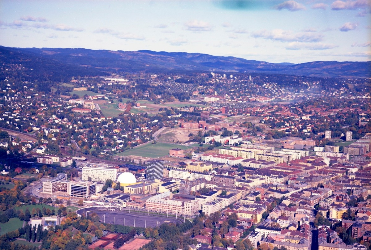 Flyfoto over Majorstua med Marienlyst og Blindern lenger bak. I bakgrunnen Nordberg og Nordmarka.